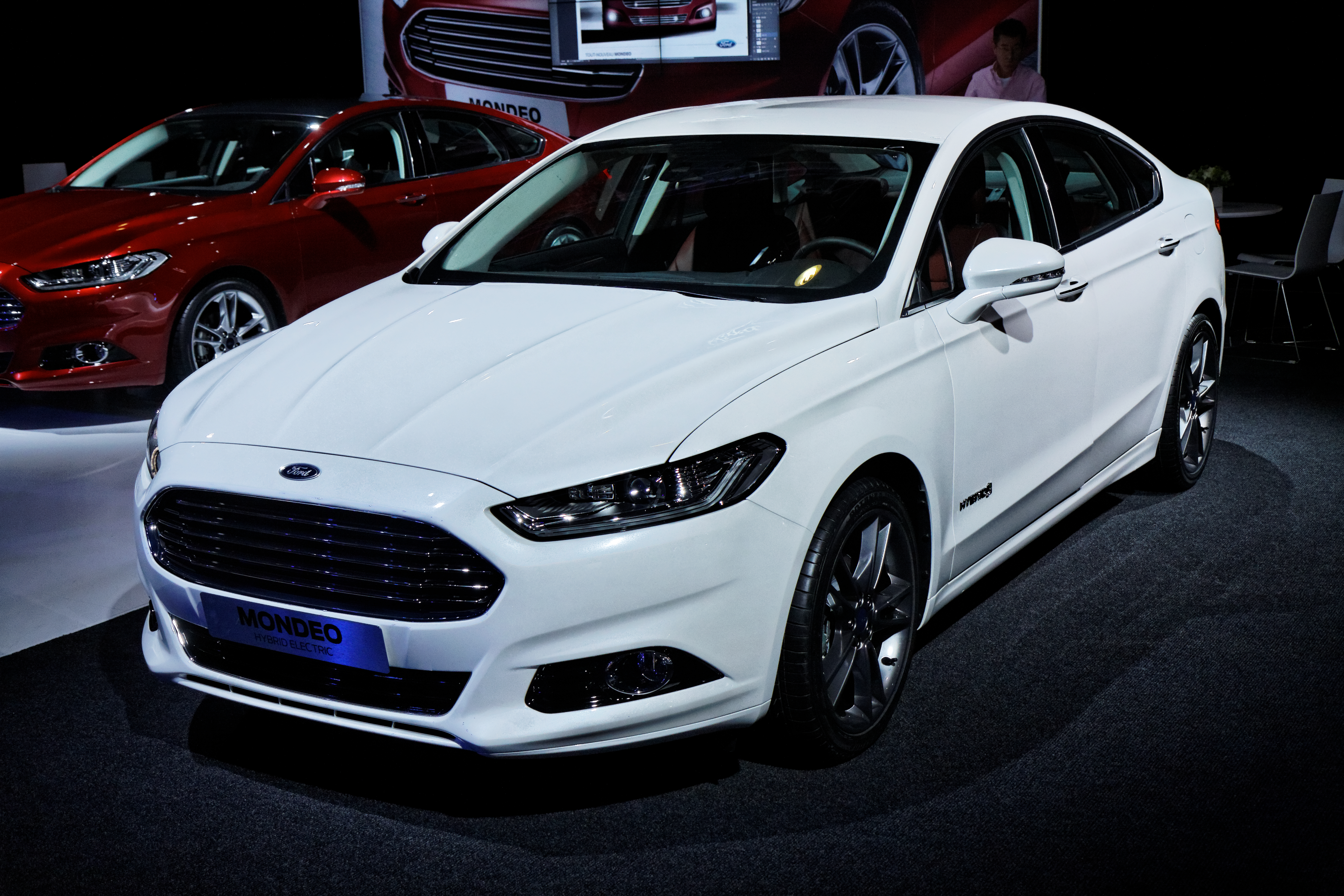 La Ford Mondeo présentée lors du Mondial de l'Automobile de Paris 2012.